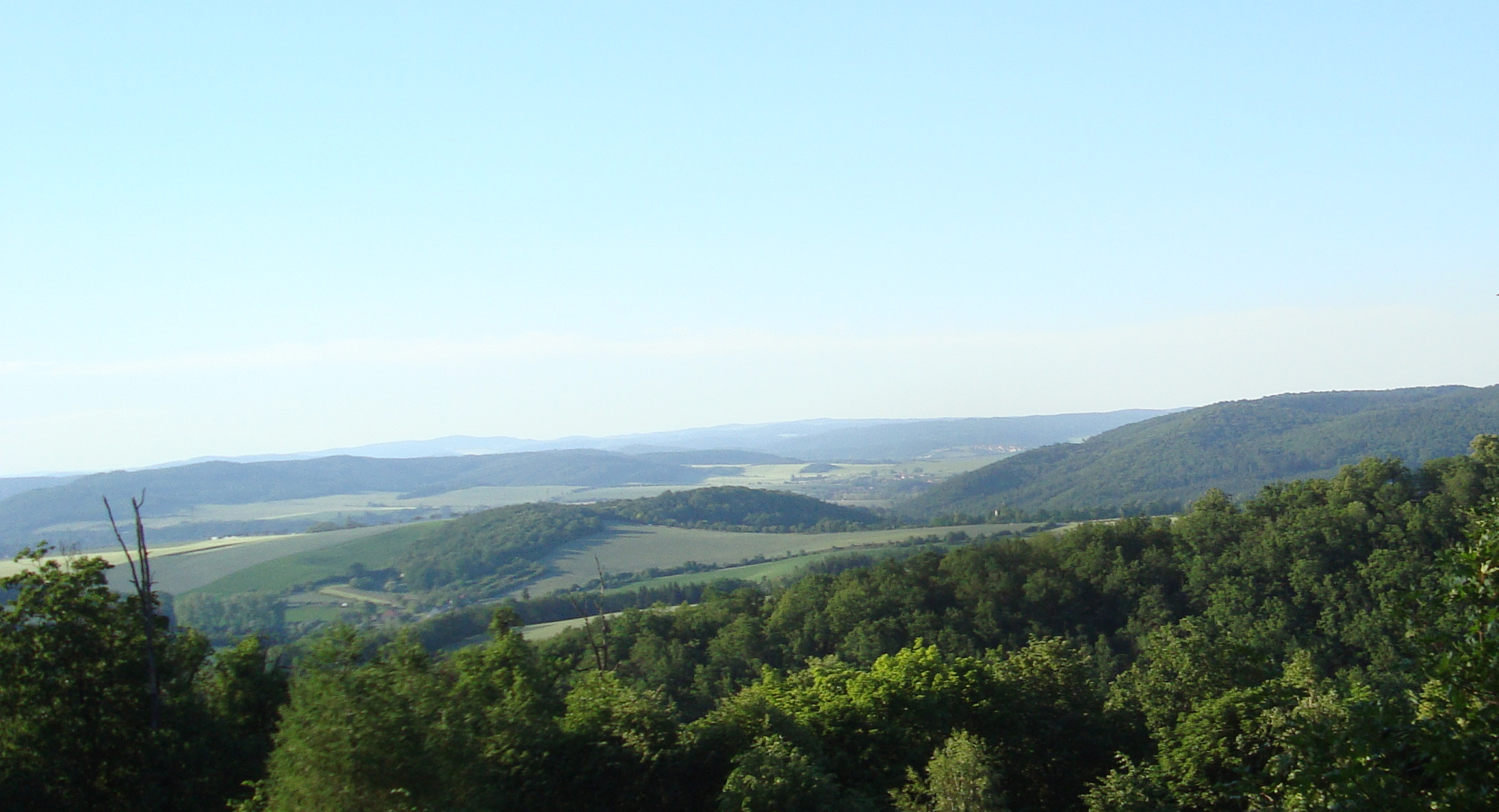 Výhled z Podkomorských lesů na Boskovickou brázdu a na obzoru na Křižanovskou vrchovinu